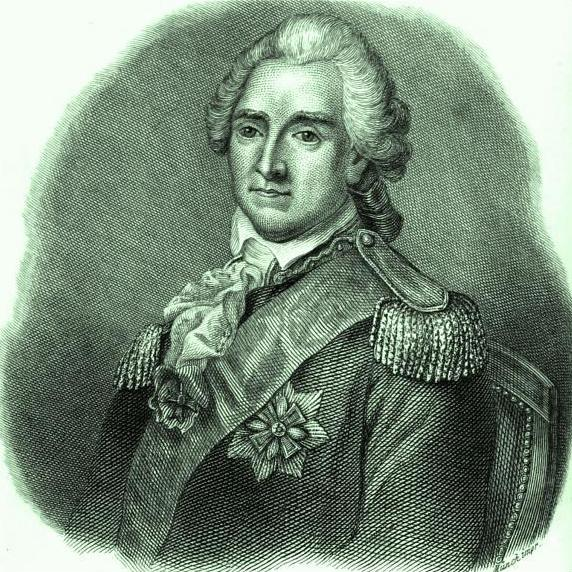 Jacob Johann Graf von Sievers